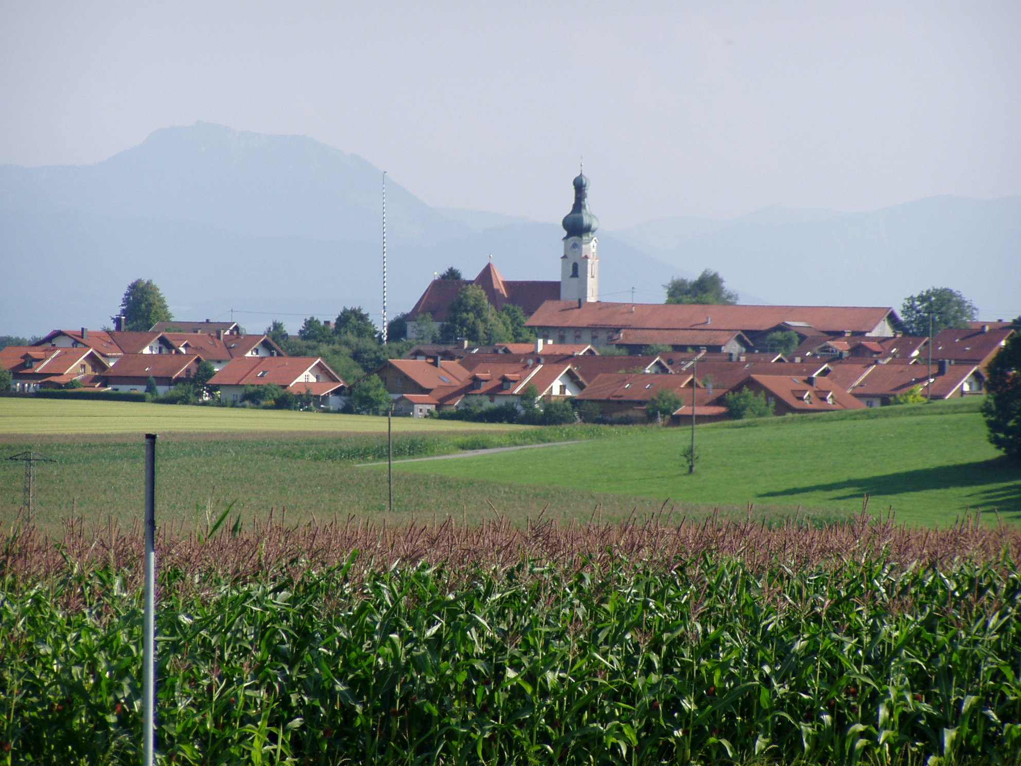 Antholing, Baiern